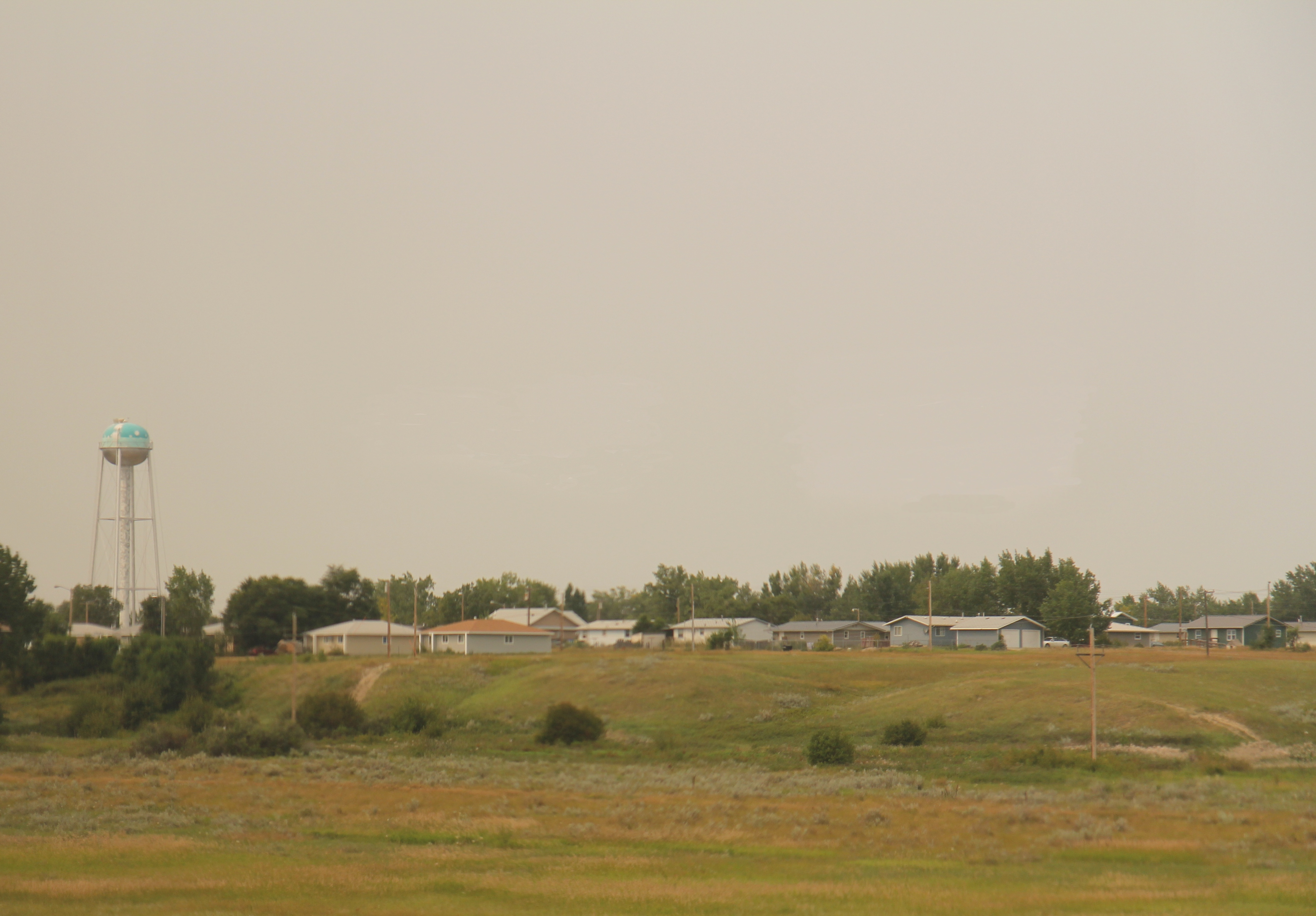 A panorama of Poplar, Montana.